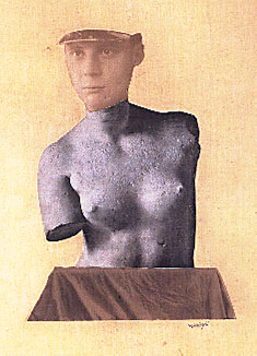 Johannes Theodor Baargeld (Alfred Emanuel Ferdinand Greunwald; 1892–1927): Typical Vertical Mess as Depiction of the Dada Baargeld (Typische Vertikalklitterung als Darstellung des Dada Baargeld), 1920, Kunsthaus Zürich, Graphische Sammlung (Ausschnitt/cropped)